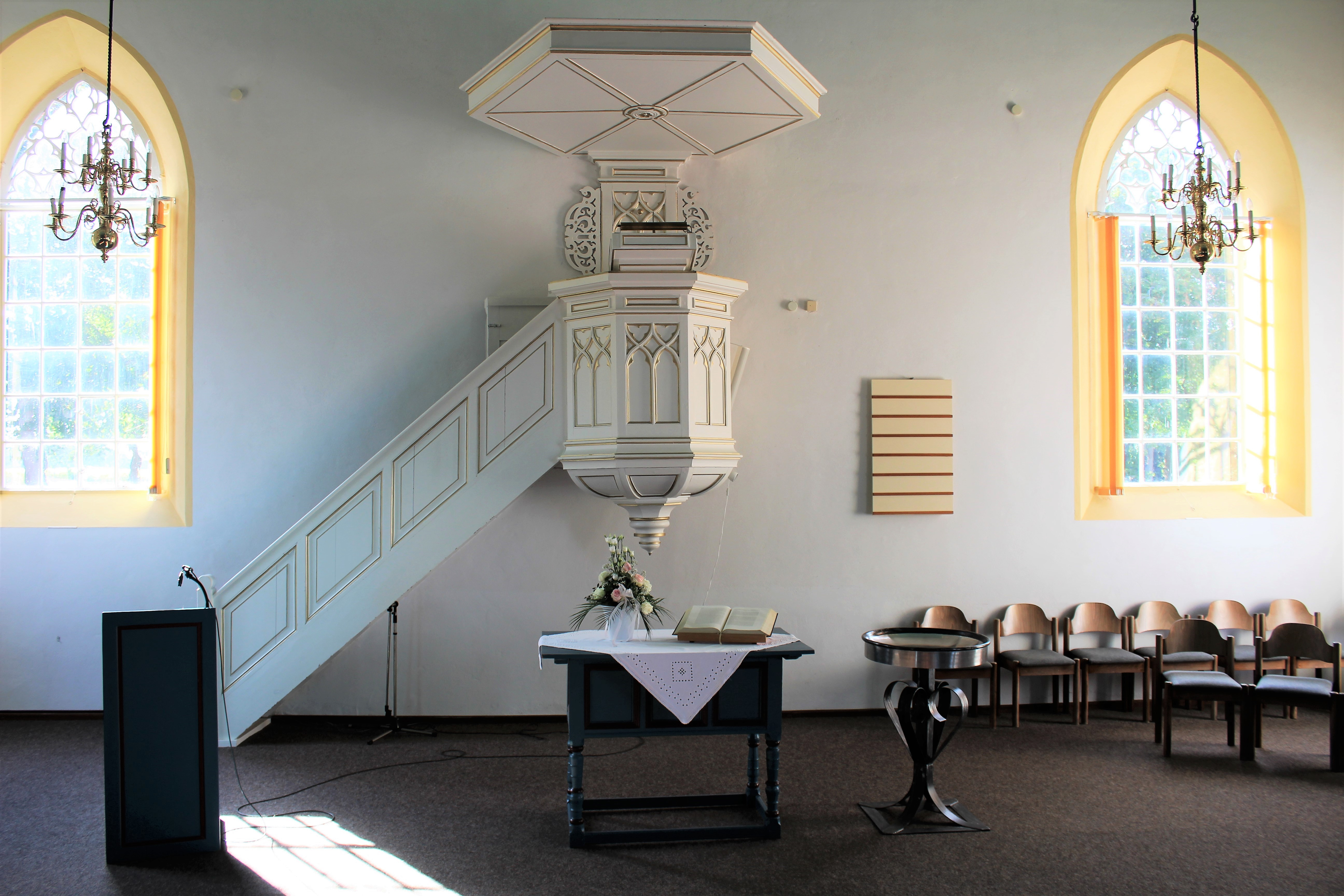 Evangelisch-reformierte Kirche Wymeer, Landkreis Leer, Niedersachsen, Deutschland